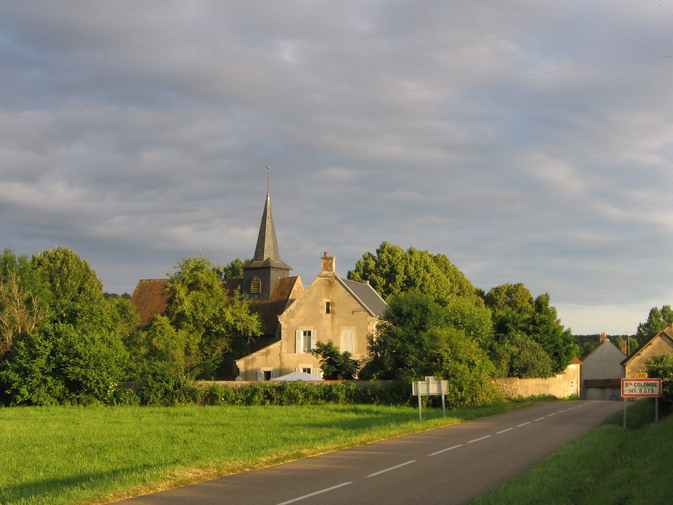 Vue du village